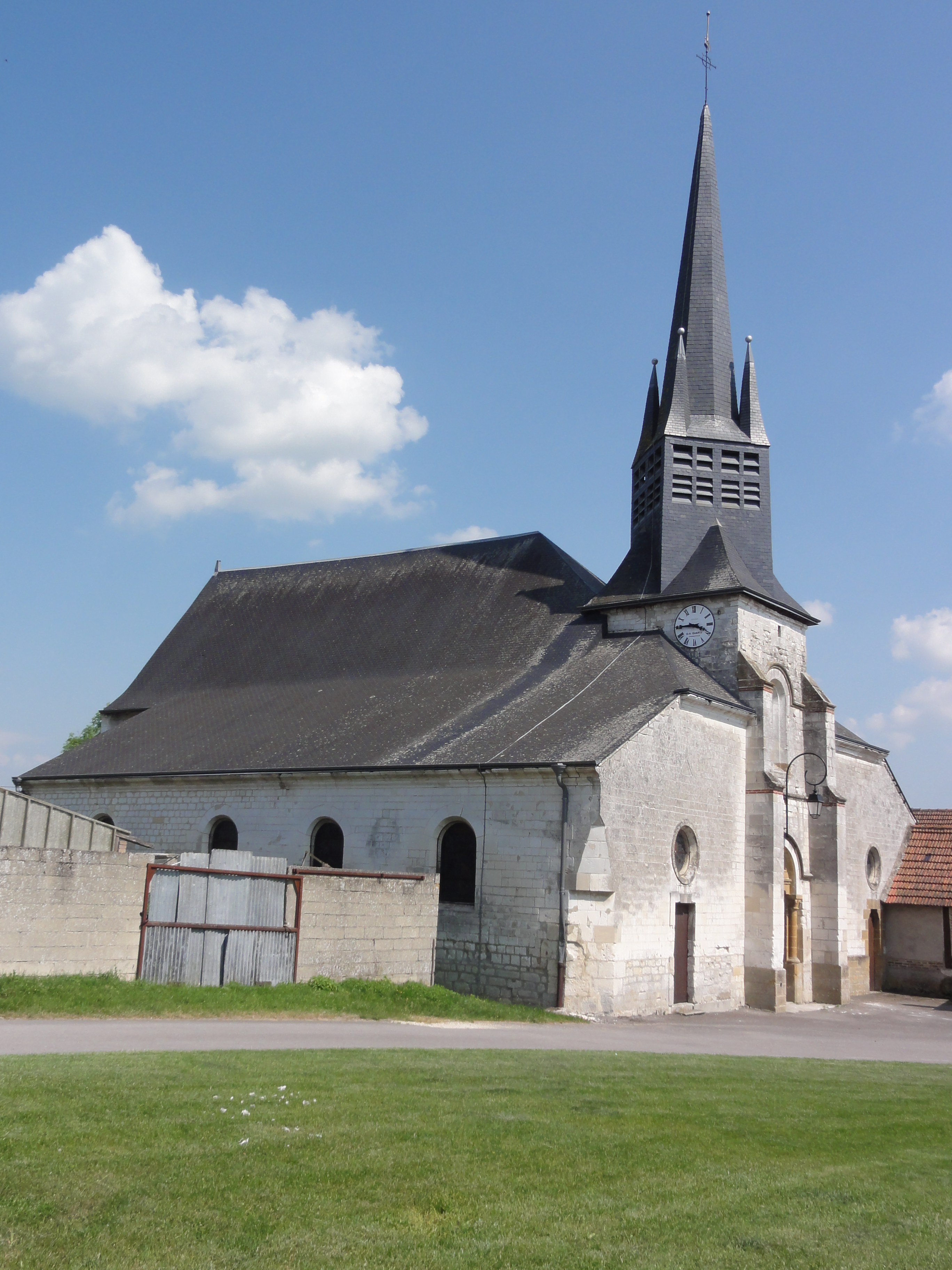 Gomont (Ardennes) Église Saint-Quentin